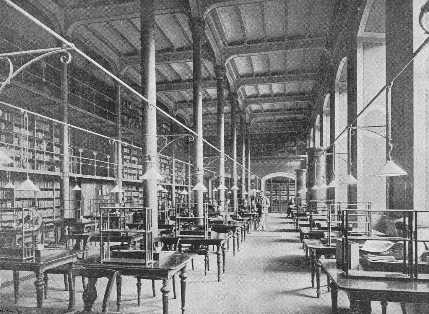 Kungl Biblioteket lässalen 1897